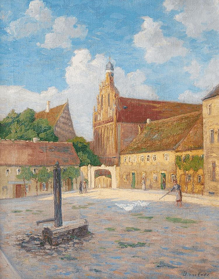 Marktplatz in einer Kleinstadt